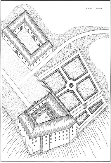 Grad Raka idealna zasnova